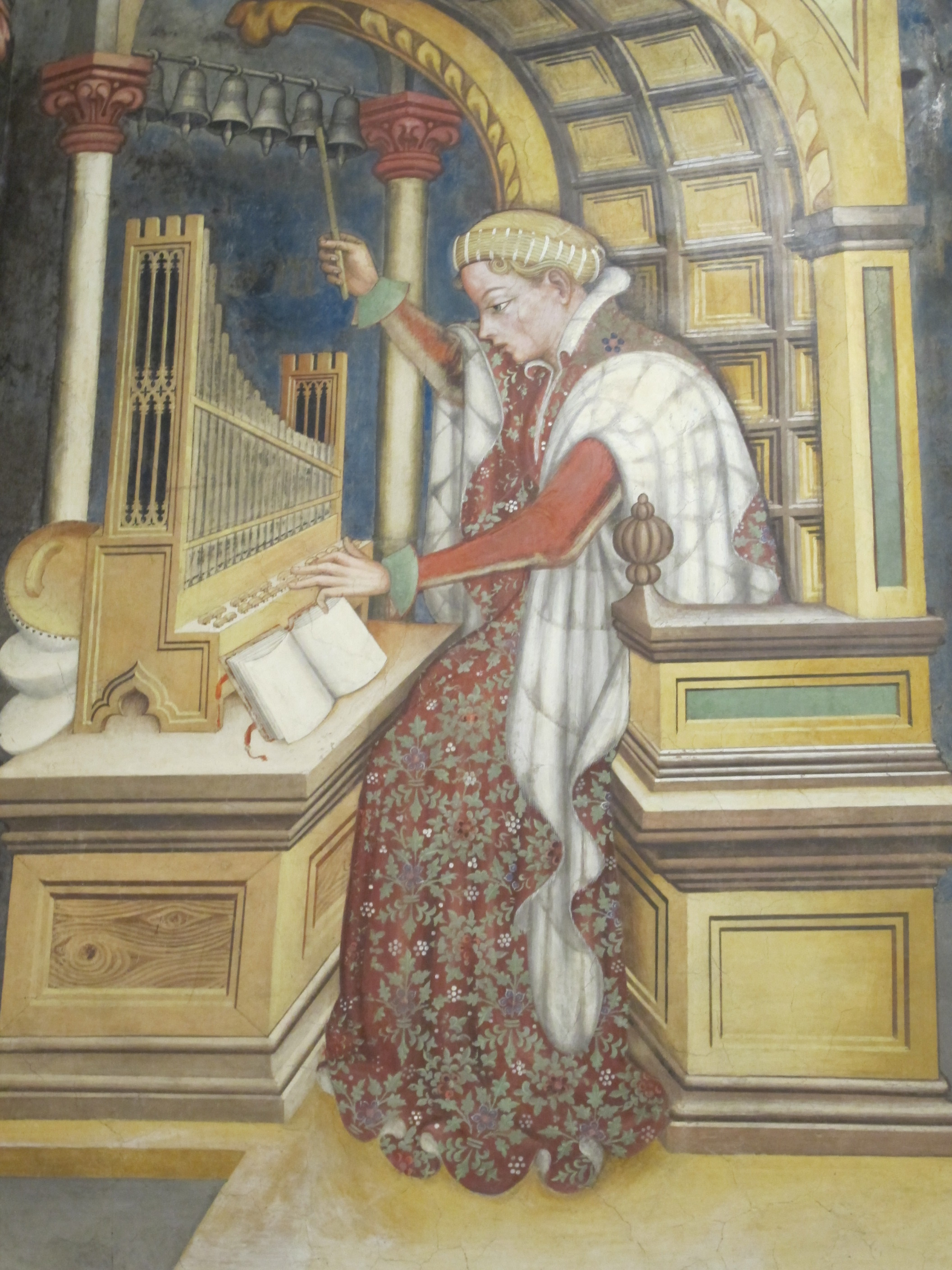 Sala delle arti liberali e dei pianeti 10.2 musica